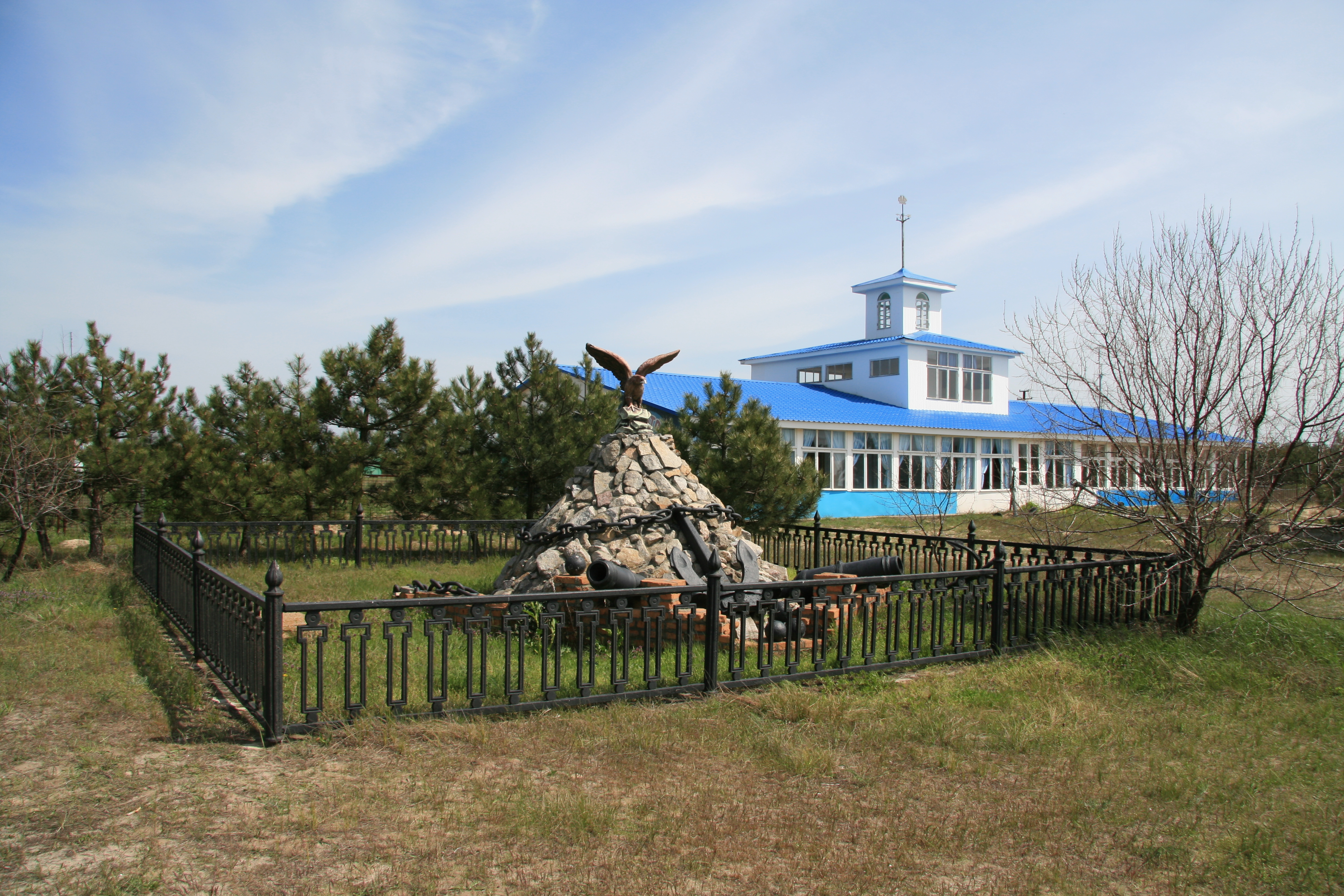 «Кінбурнська коса», Очаківський р-н